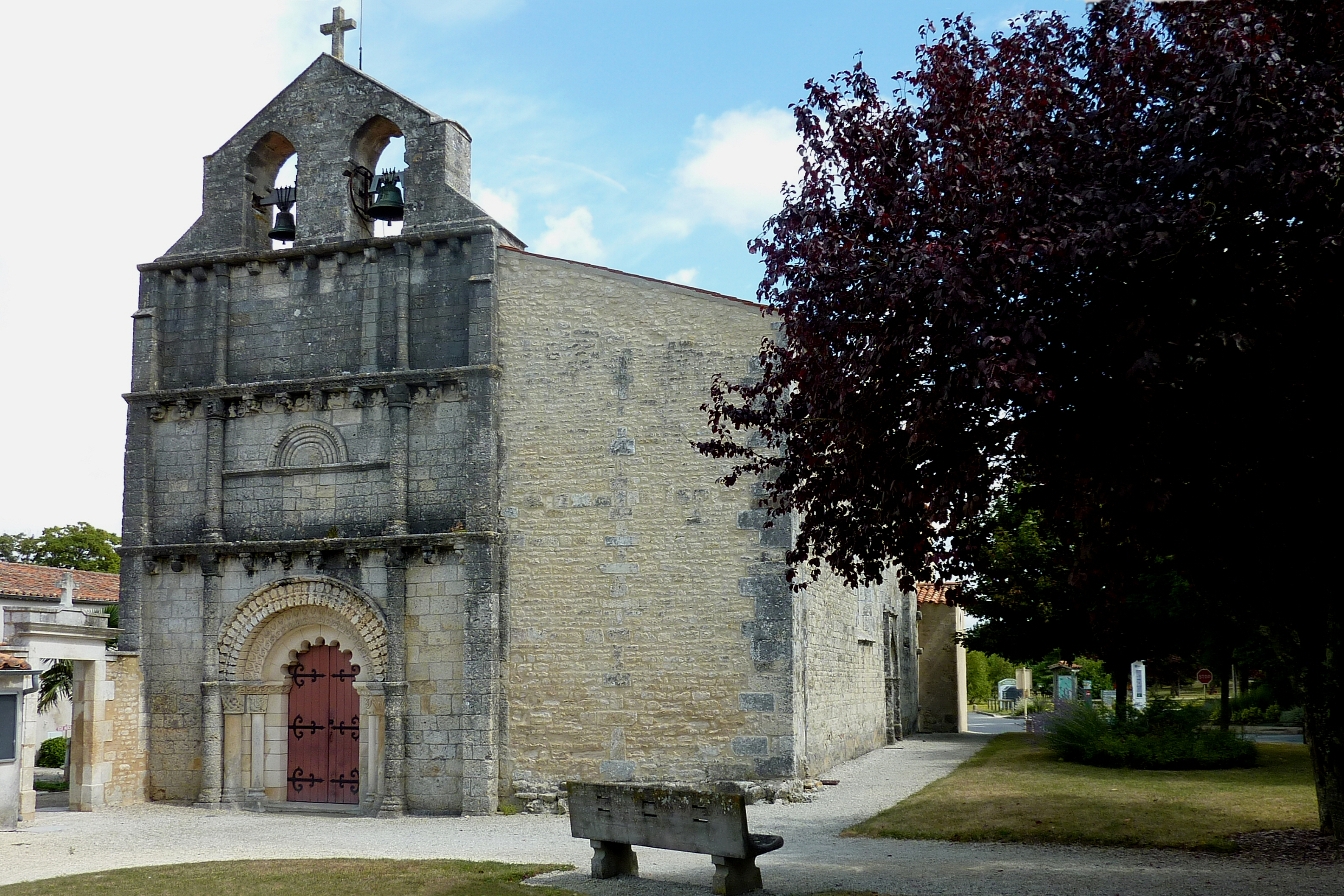 Eglise Notre-Dame de La Jarne Charente-Maritime France